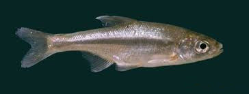 un ejemplar en su entorno natural